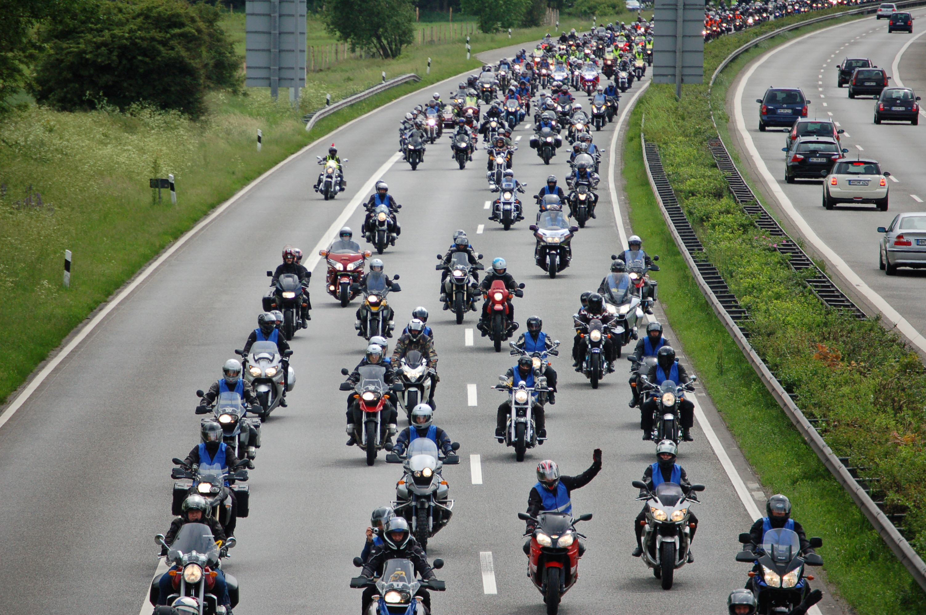 Der Konvois der Motorräder vom MOGO Hamburg über die A7 zur großen Abschlussparty nach Kaltenkirchen, Schleswig-Holstein